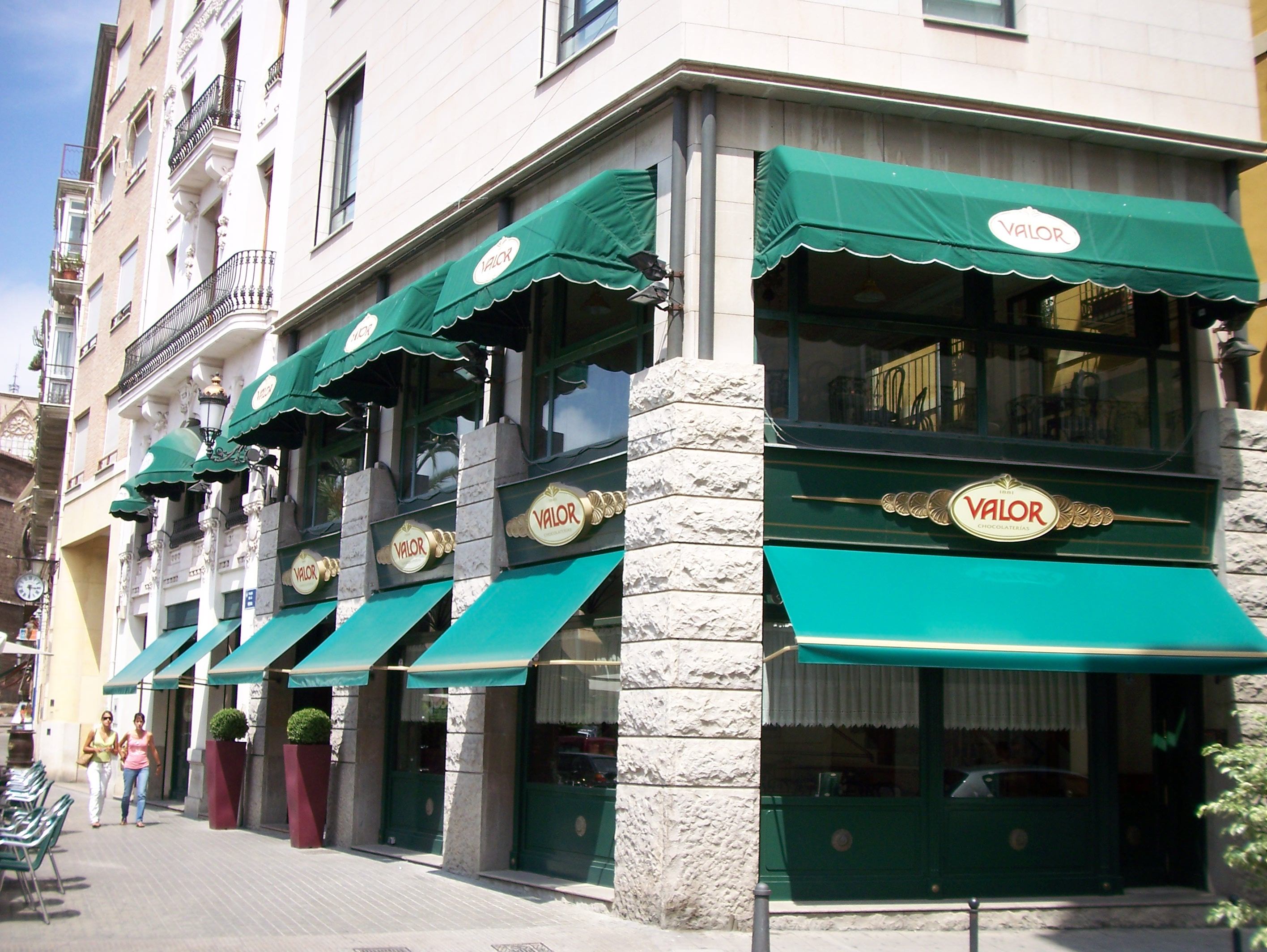 Valor Valencia